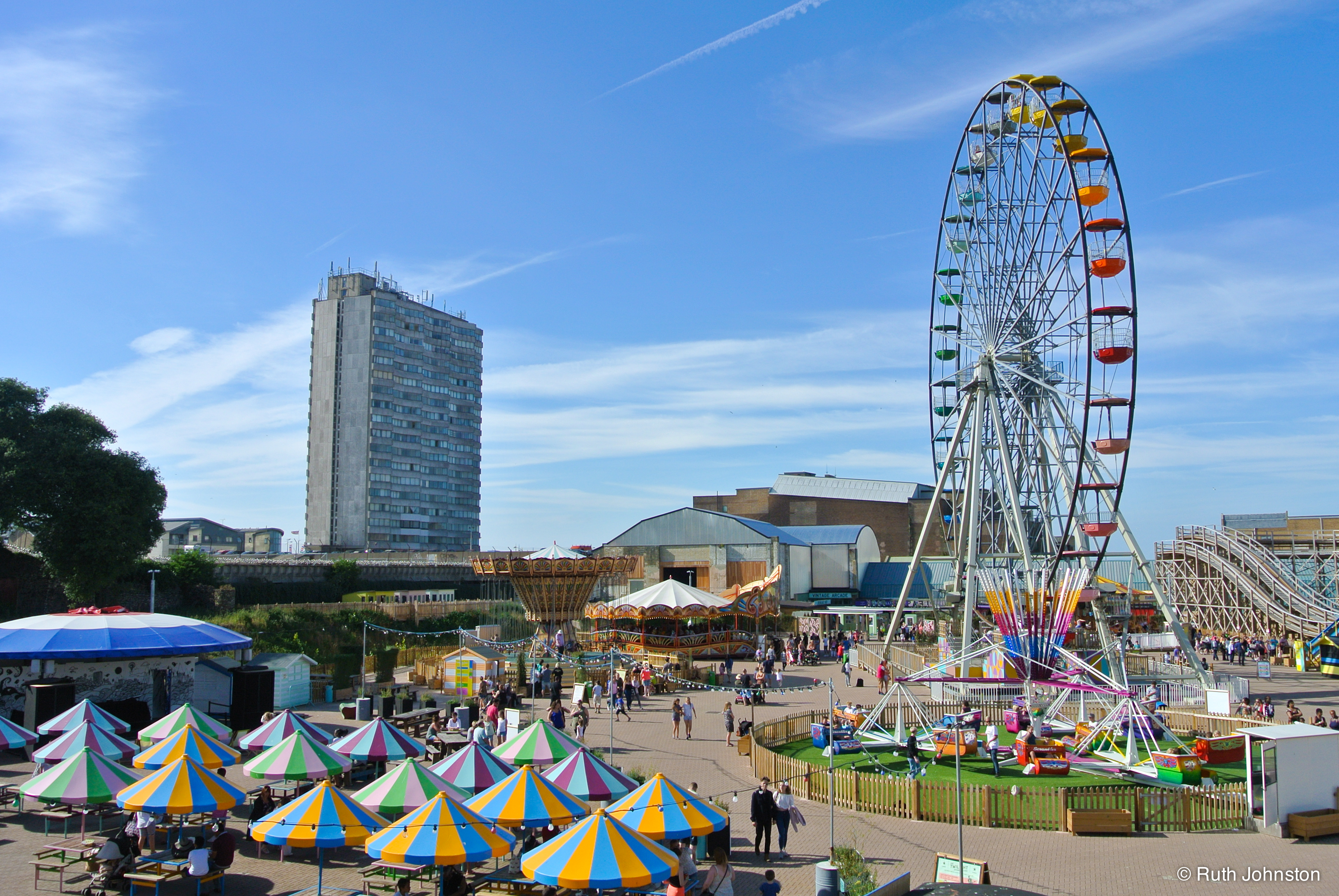 Midweek Birthday Margate Mini-Break-3220160816.jpg